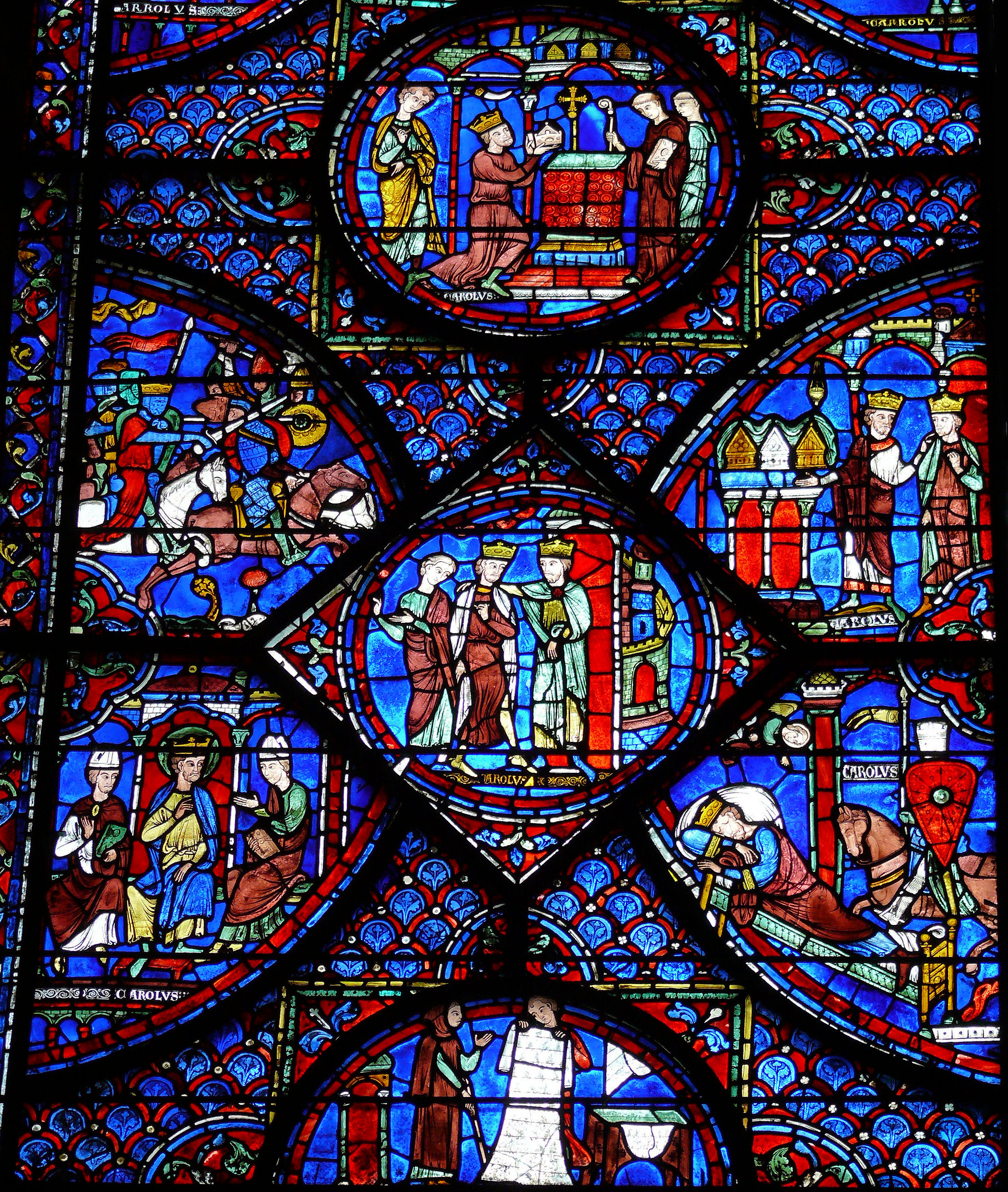 Cathédrale de Chartres - Chevet - Vitrail de Charlemagne